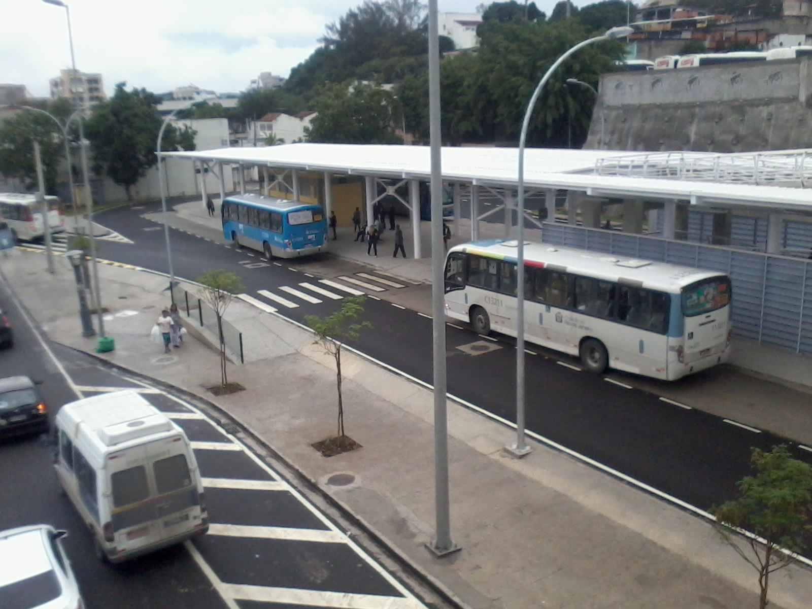 Terminal Bandeira Brasil vista da passarela sobre a Estrada dos Bandeirantes